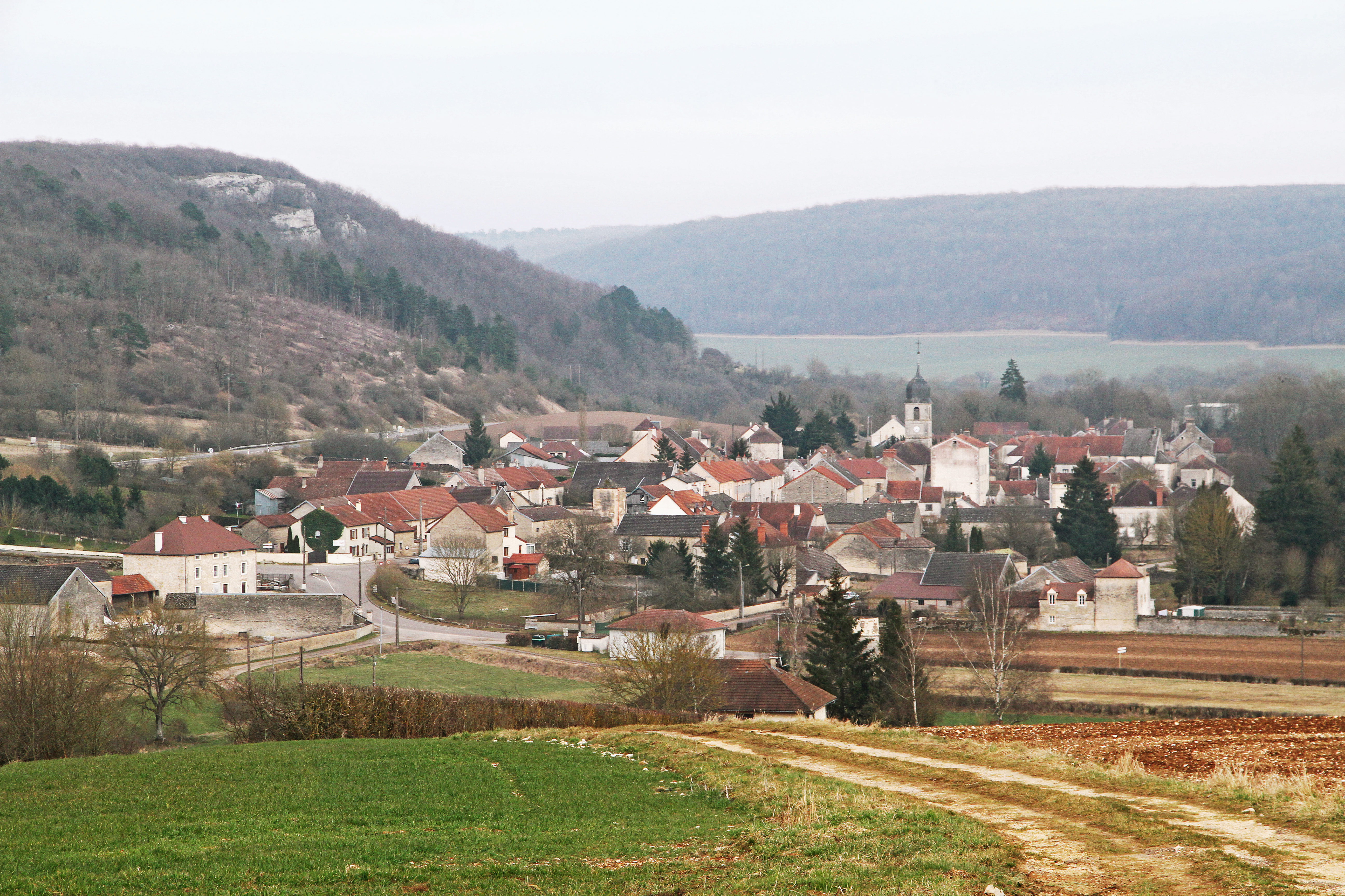 Village de Lamargelle vu du Coteau Raguin